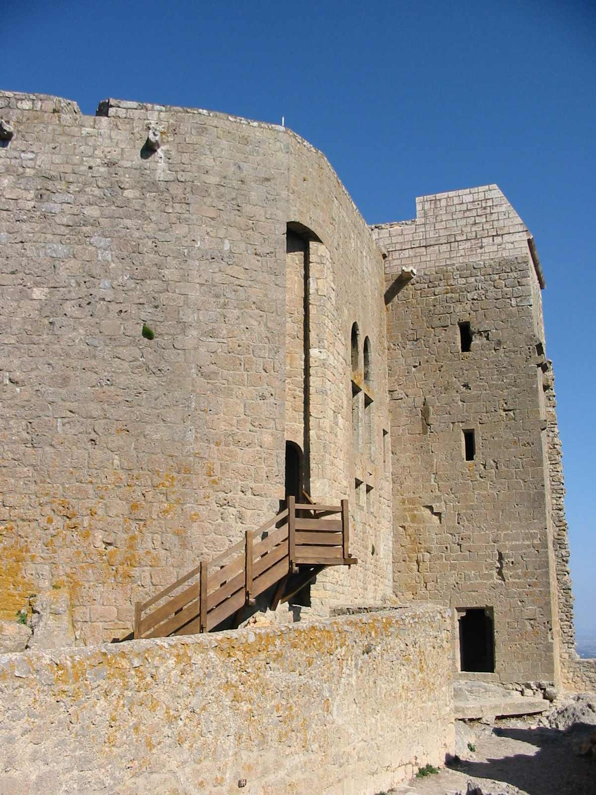 Chateau de Queribus, dans le 66. Auteur : Pereubu (